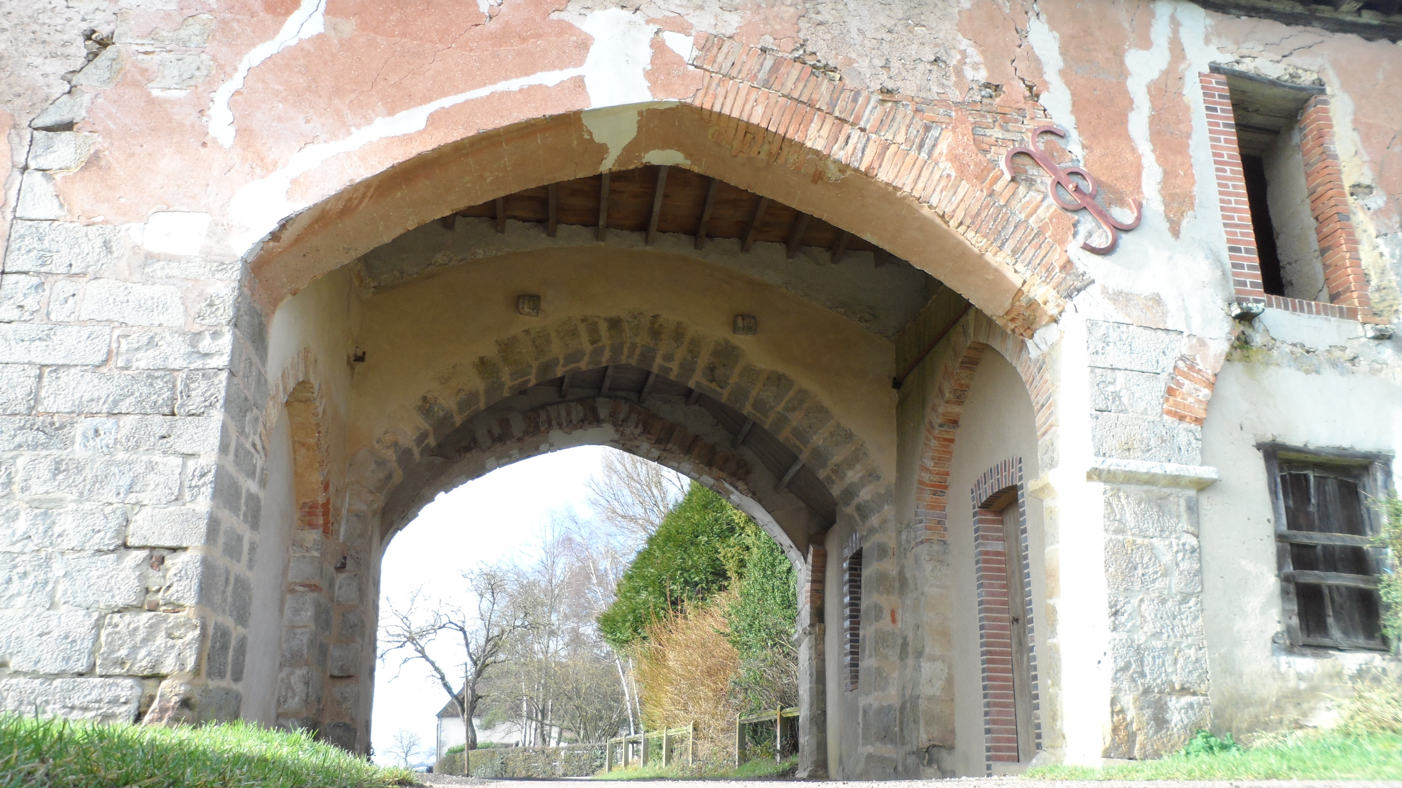 La porterie de l'abbaye des Echarlis de lordre de Citeaux fondée en1108 à Villefranche-Saint-Phal (Yonne)